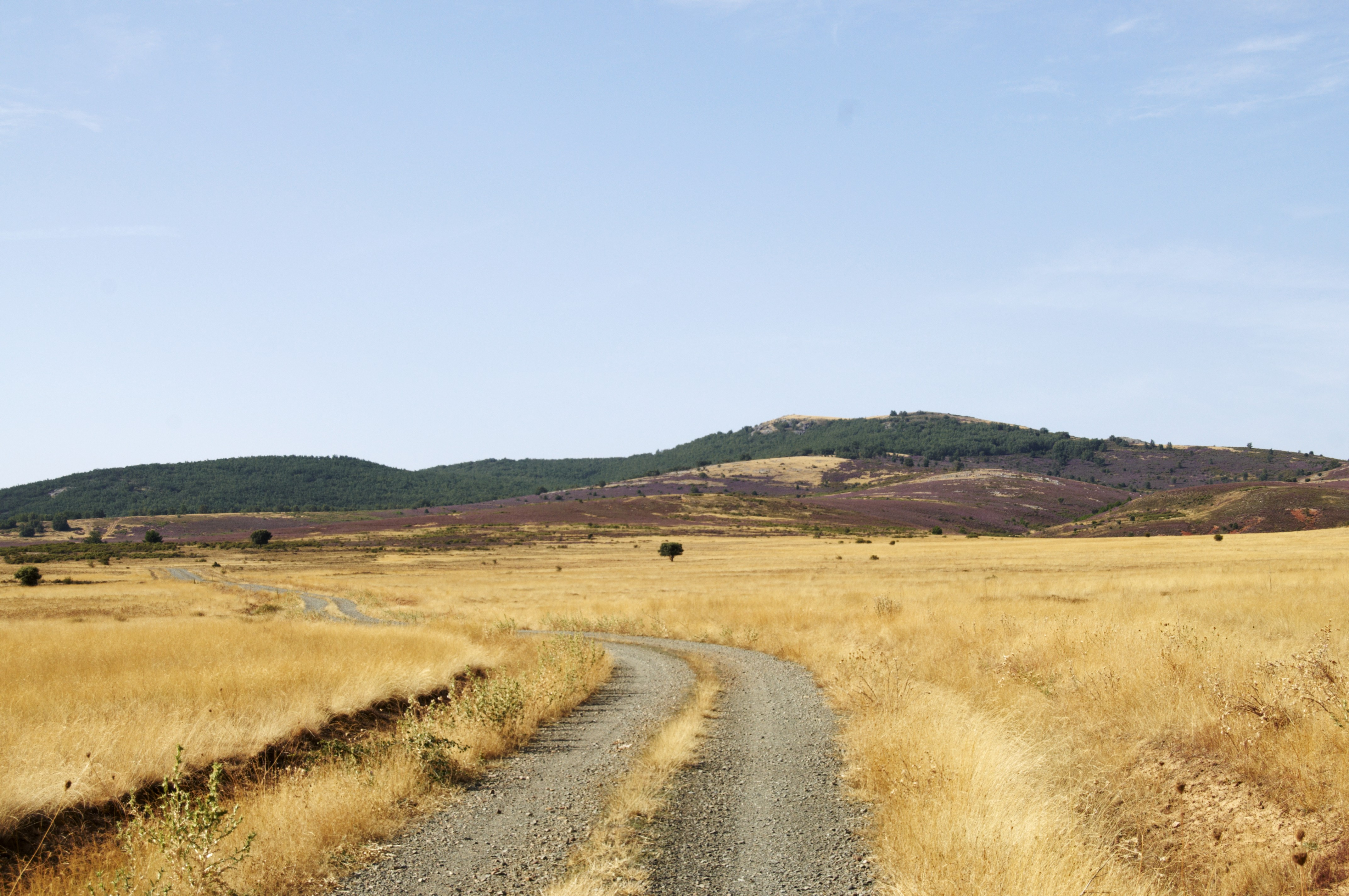 Caminante no hay camino